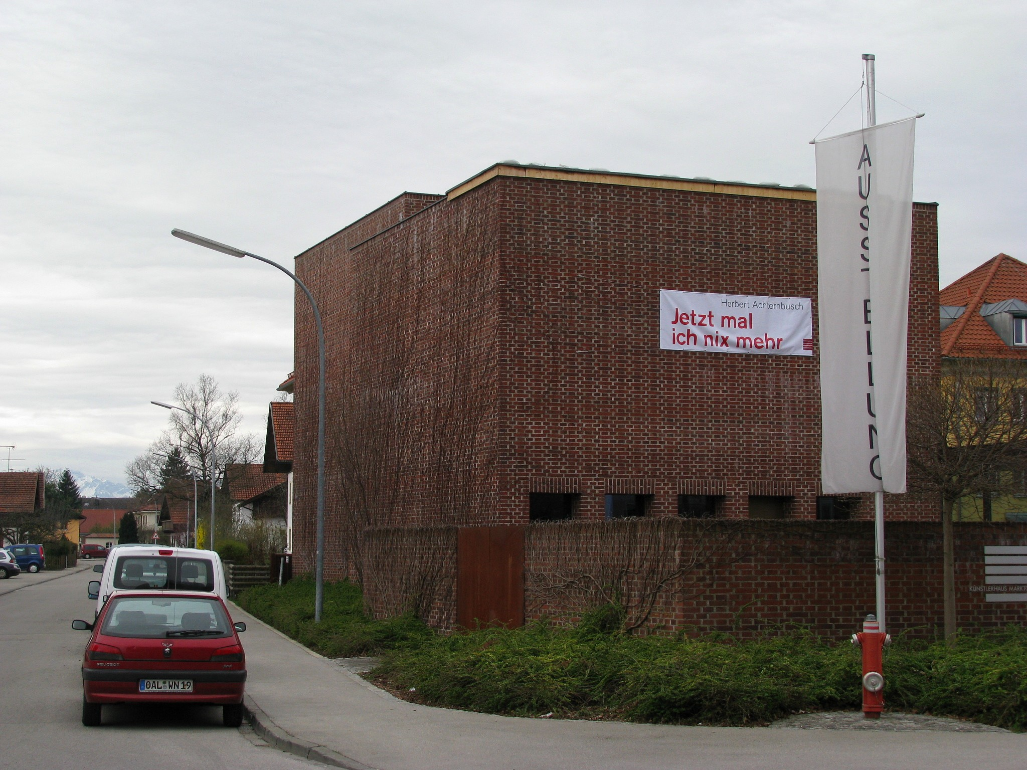 Künstlerhaus Marktoberdorf; Ansicht von Norden